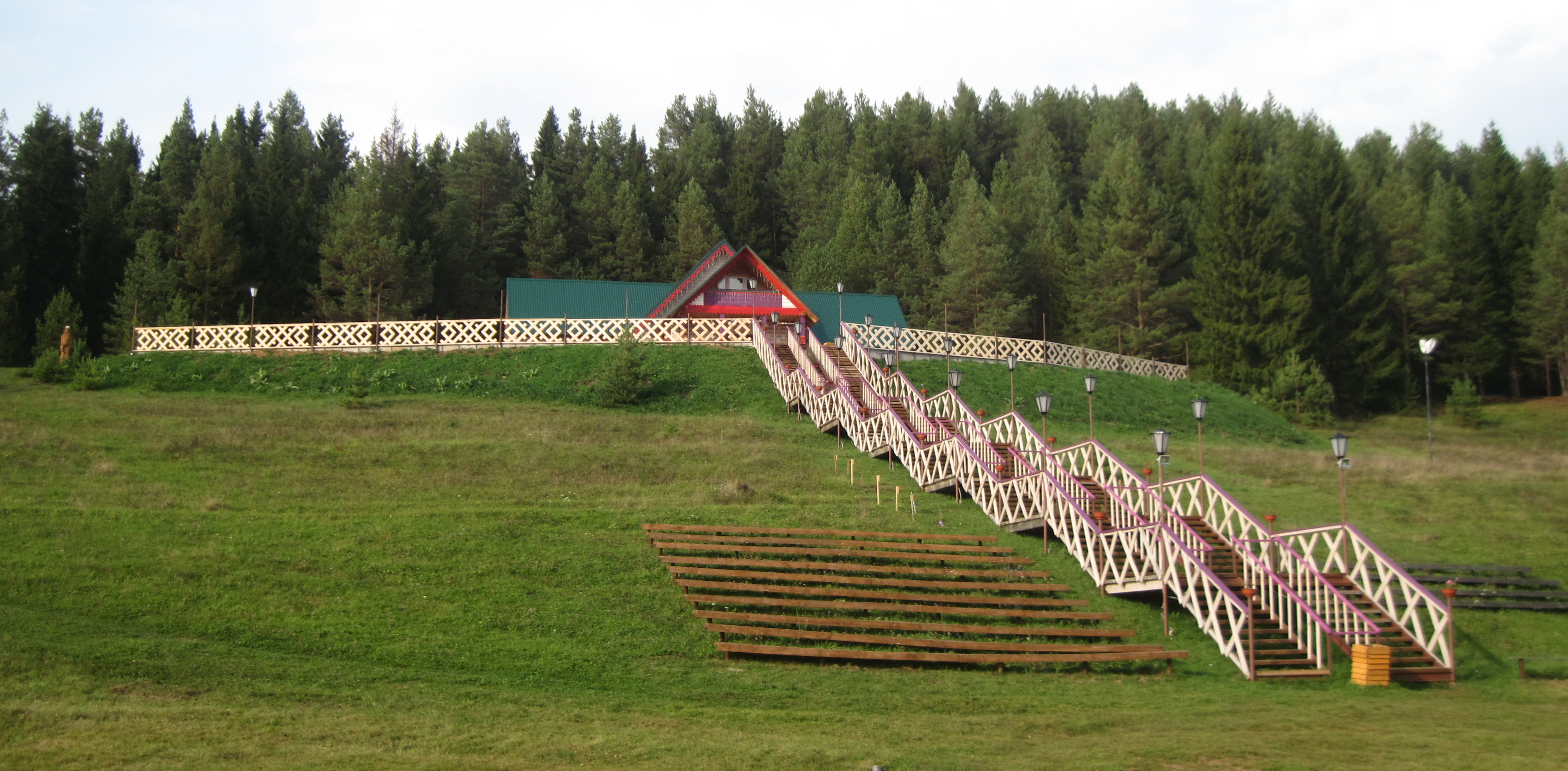 Резиденция удмуртского Деда Мороза в селе Шаркан.Лестница ведет к усадьбе Тол Бабая на вершине холма.